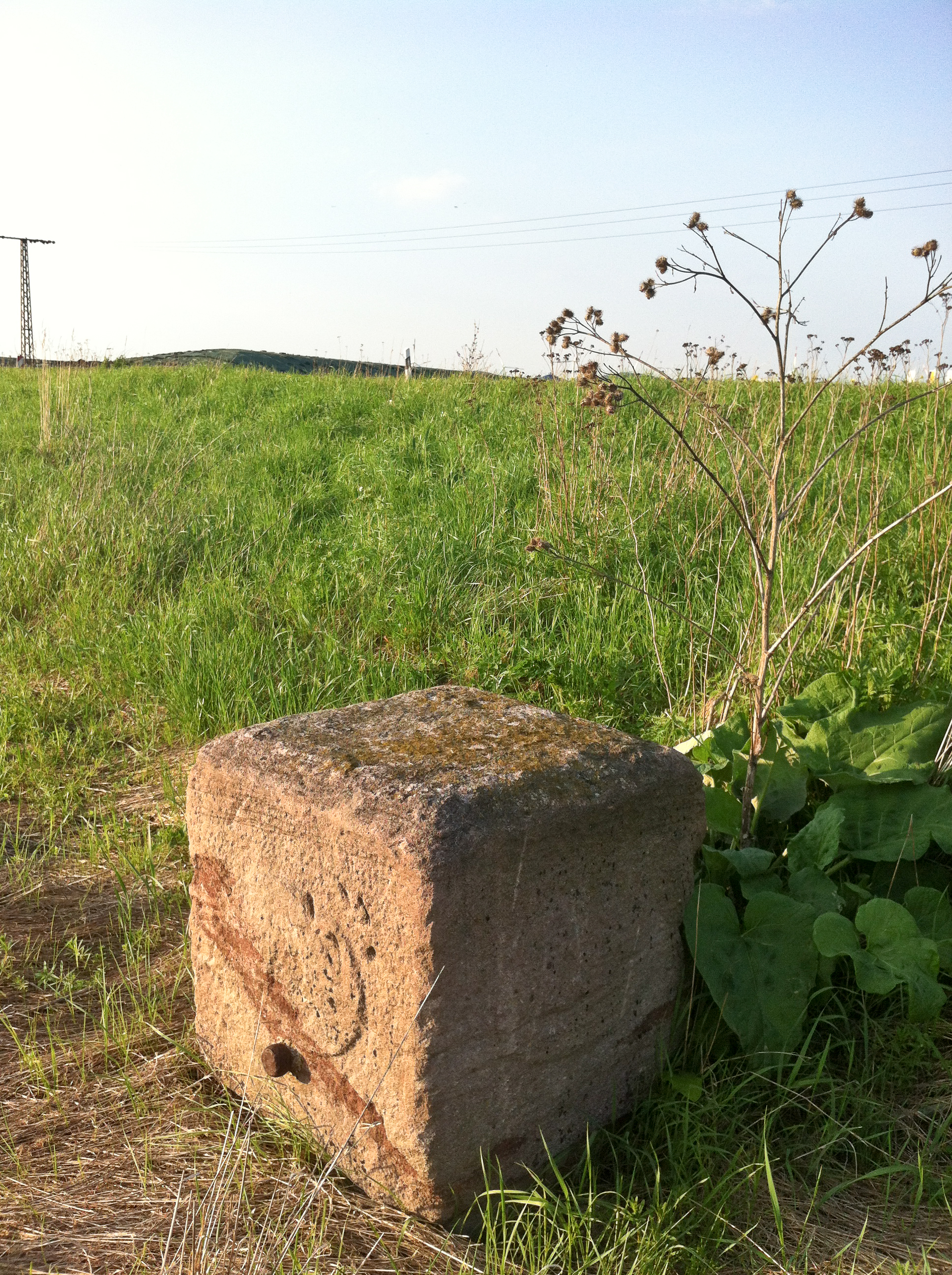 Preußischer Viertelmeilenstein zwischen Könnern und Garsena